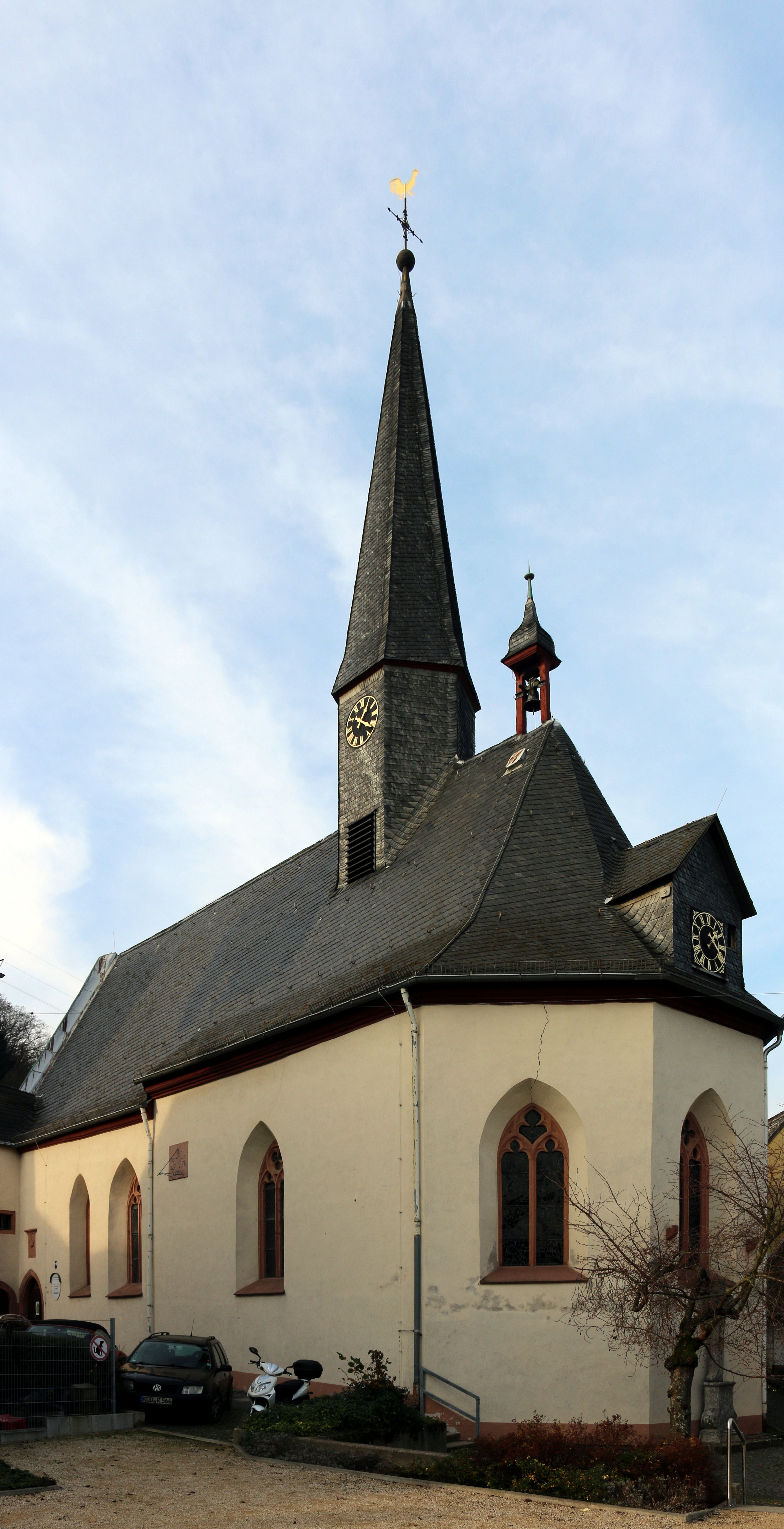 Martinsthal, Rheingau: Alte katholische Pfarrkirche St. Sebastian und Laurentius. Die gothische Kirche wurde 1429 geweiht